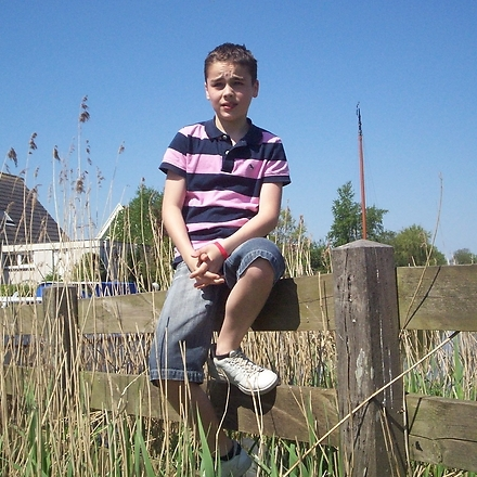 Jordy van Loon